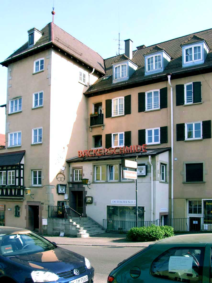 Gasthaus Bäckerschmide in Stuttgart-Gaisburg